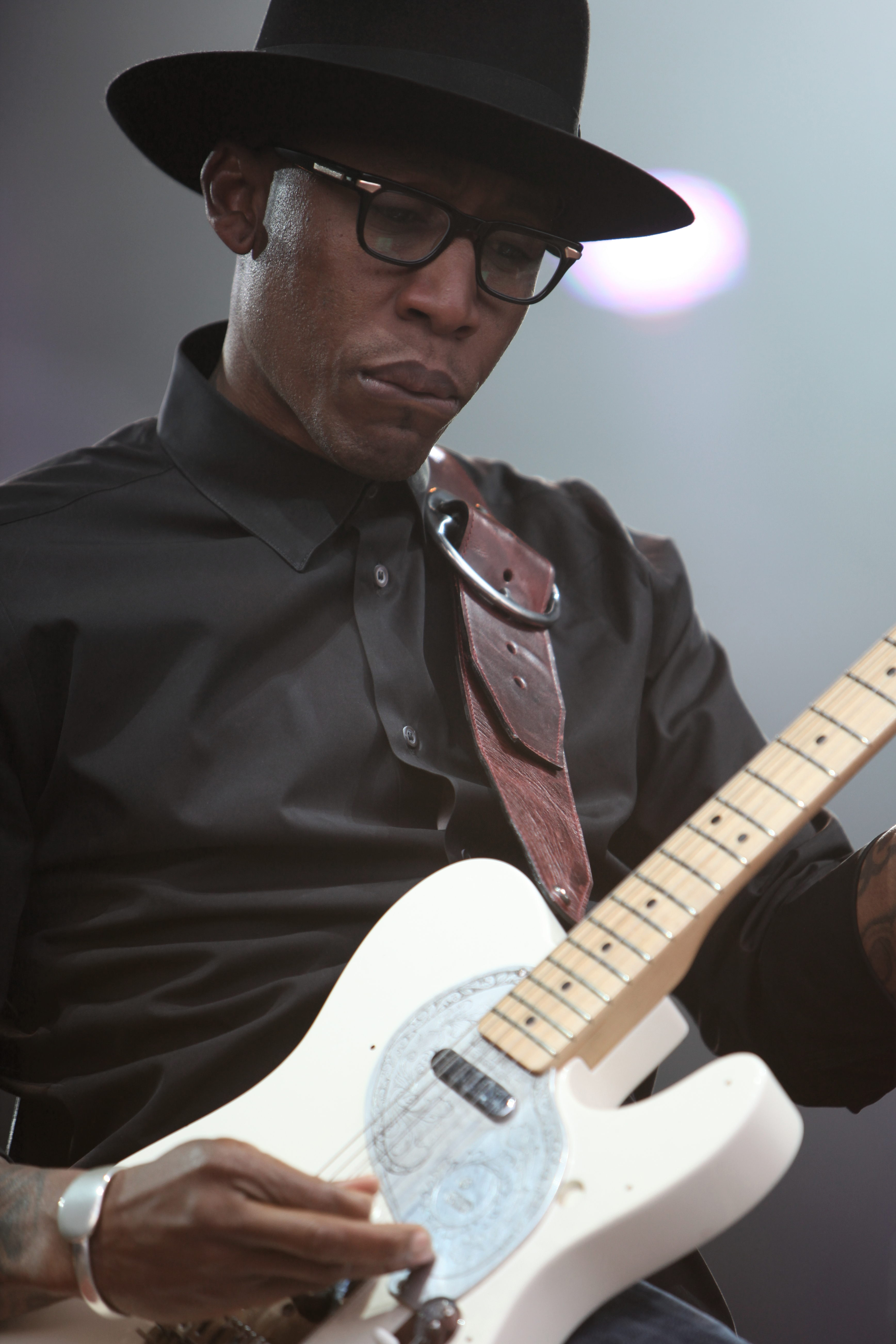 Raphael Saadiq at the Eurockéennes de Belfort 2011